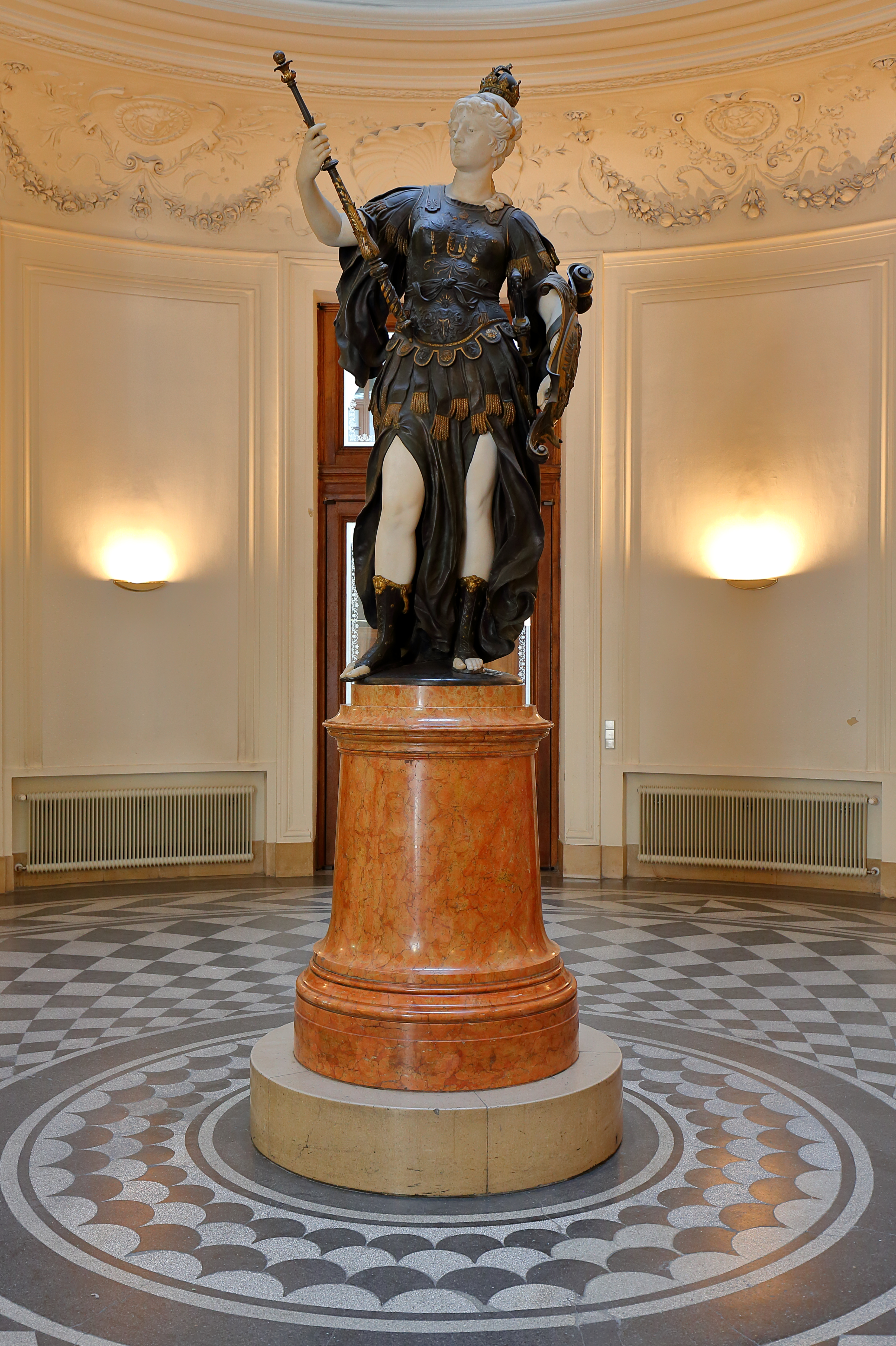 Die Allegorie „Austria“. Die Statue aus Bronze und Marmor ist ein Werk von Johannes Benk aus dem Jahre 1883. Sie wurde im gleichen Jahr im Zentrum des Vestibüls der neu errichteten Länderbankzentrale in der Hohenstaufengasse 3 im 1. Wiener Gemeindebezirk Innere Stadt aufgestellt. Durch diese Figur konnte Otto Wagner, Architekt des Gebäudes, den unvermeidlichen Knick der Gebäudeachse „maskieren“.